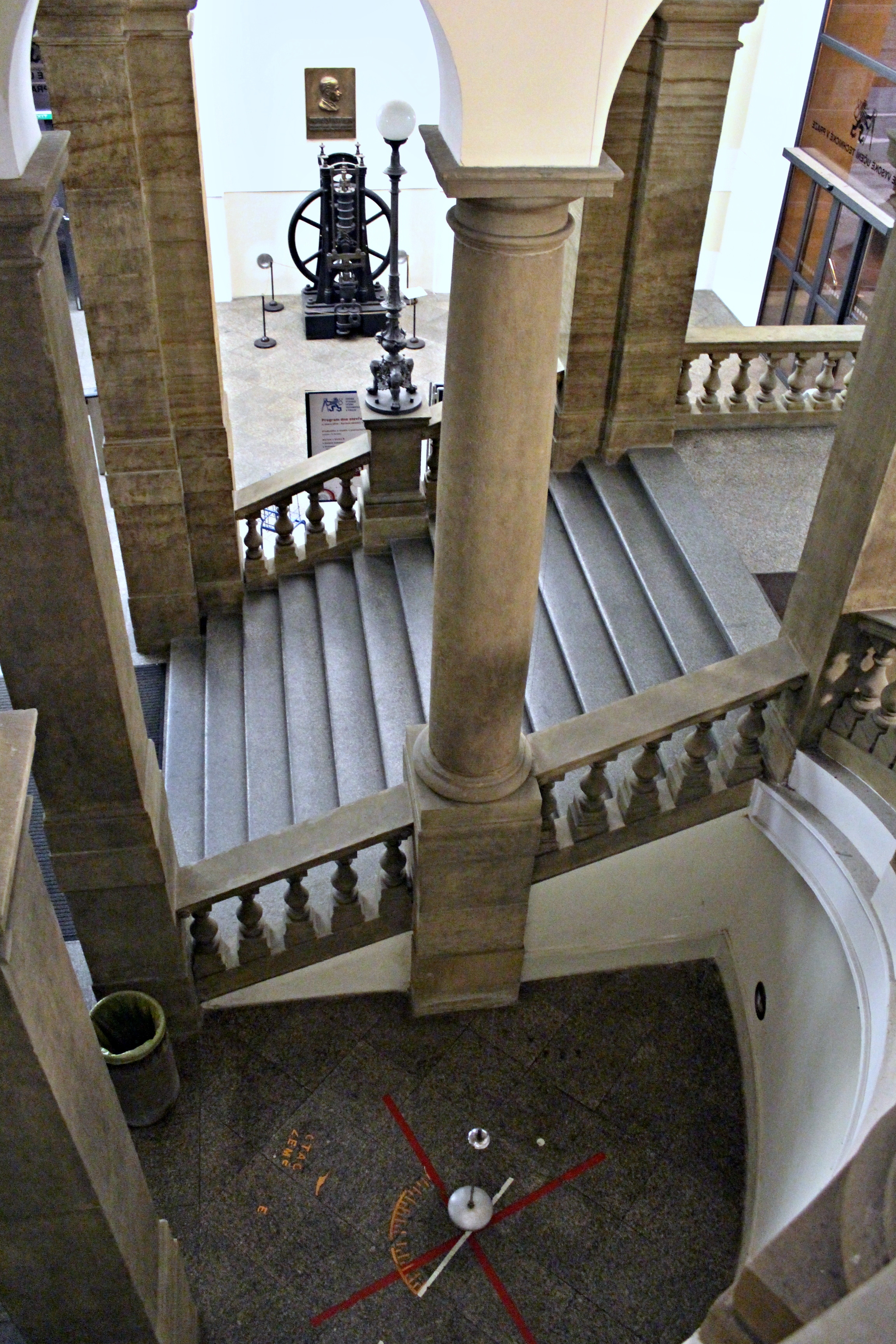 Karlovo náměstí, ČVUT